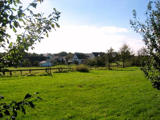 Ortsansicht von Hömel (Gemeinde Nümbrecht)